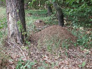 Formica polyctena - Nesthügel Foto: Michael Linnenbach - GNU FDL